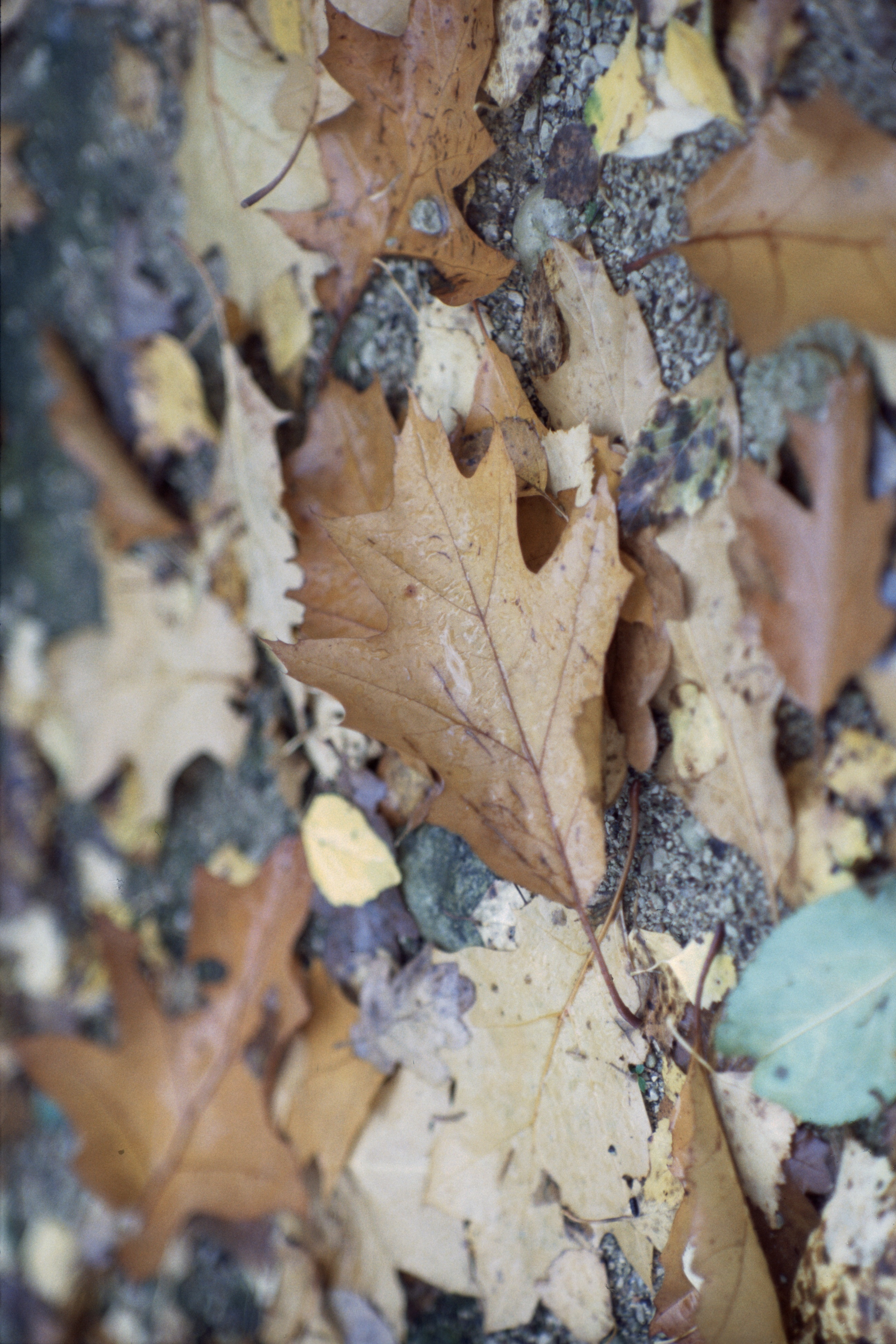 Lehepisar punase tamme (Quercus rubra) lehel